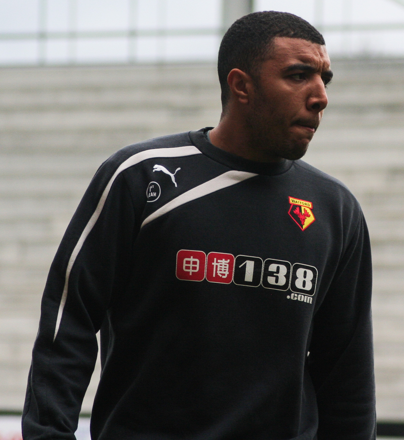 Troy Deeney